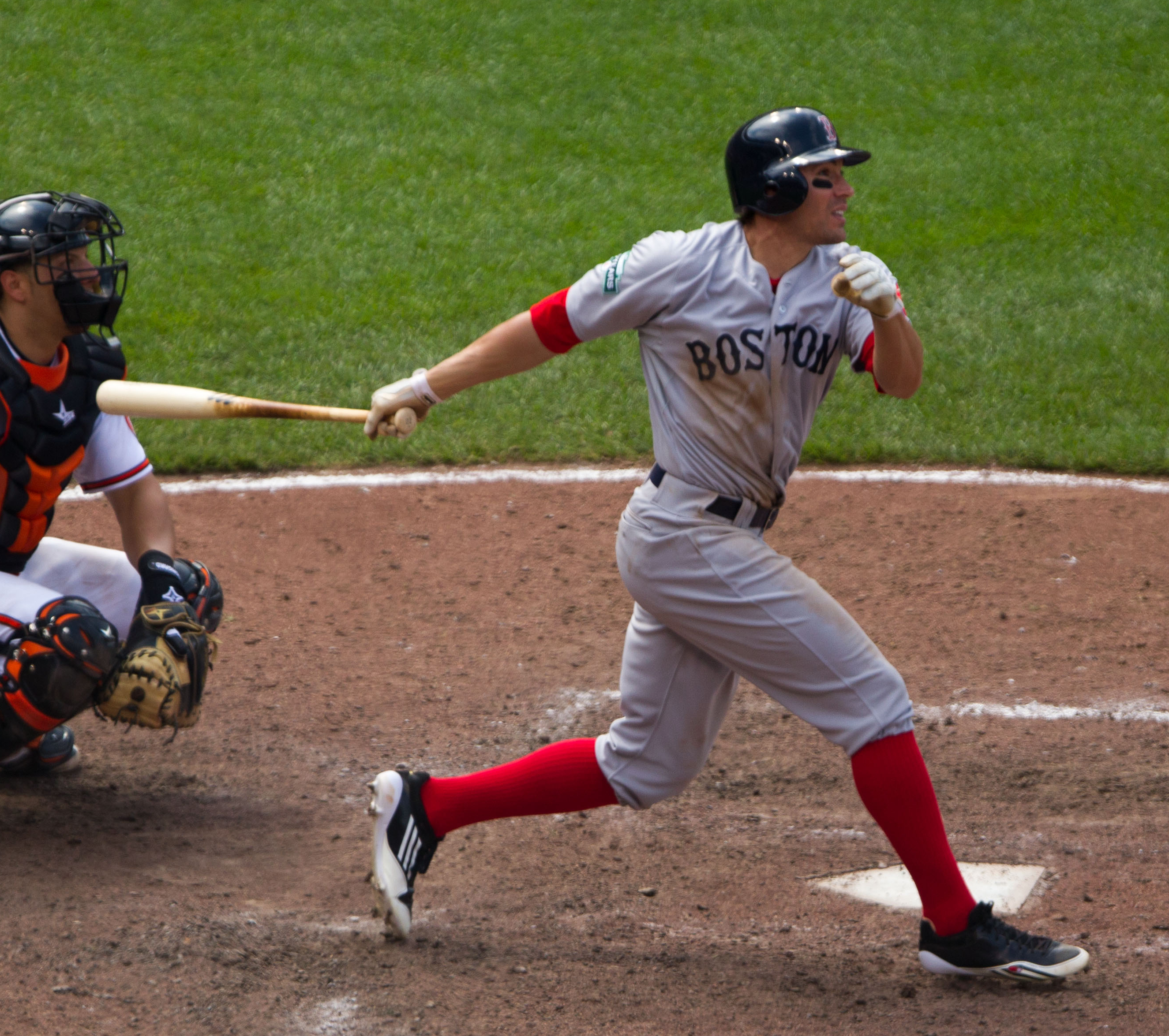 Scott Podsednik